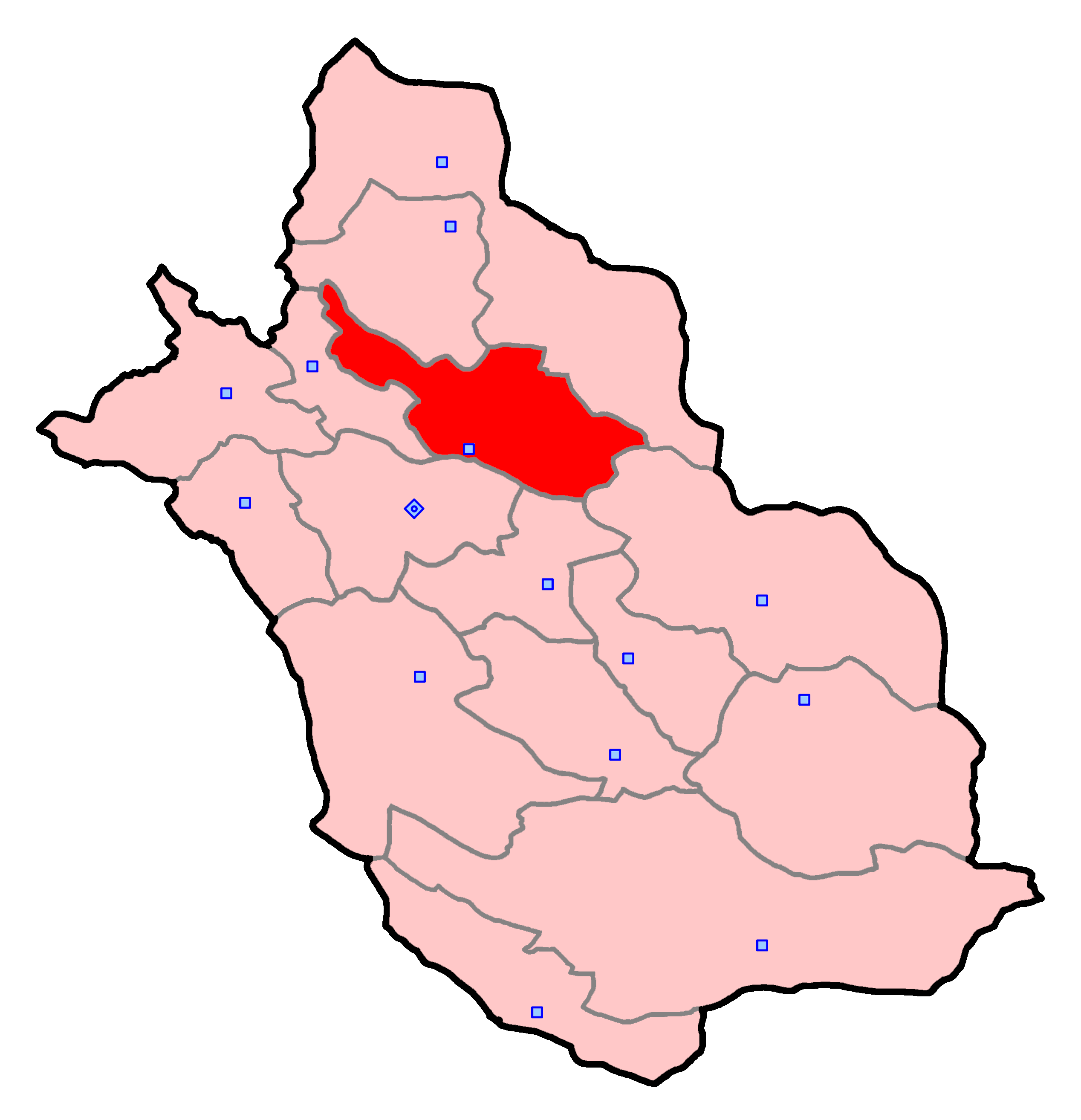 حوزهٔ انتخاباتی مرودشت و پاسارگاد و ارسنجان برای انتخابات مجلس شورای اسلامی